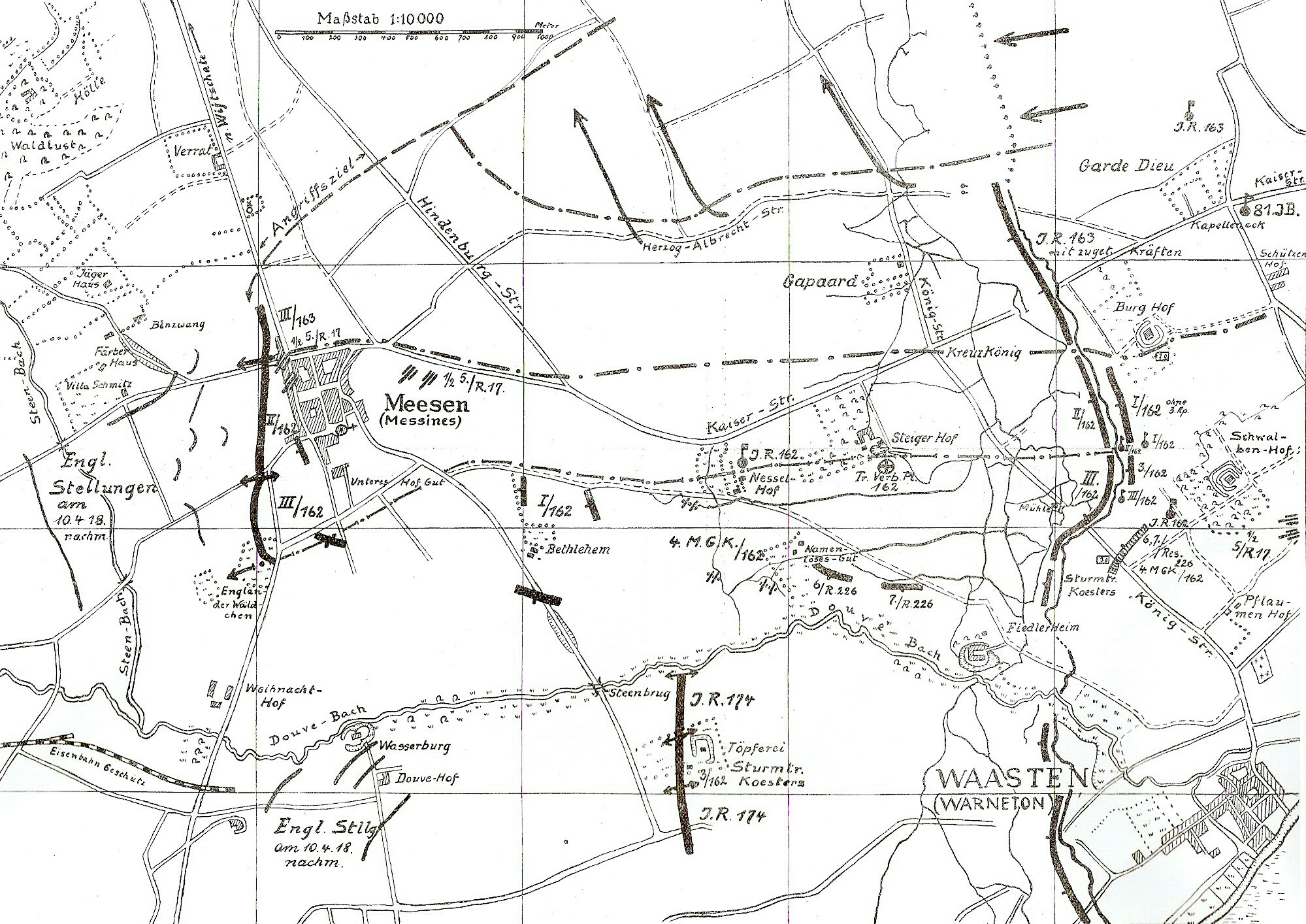 Angriff des I.R. 162 auf Meesen am 10. April 1918